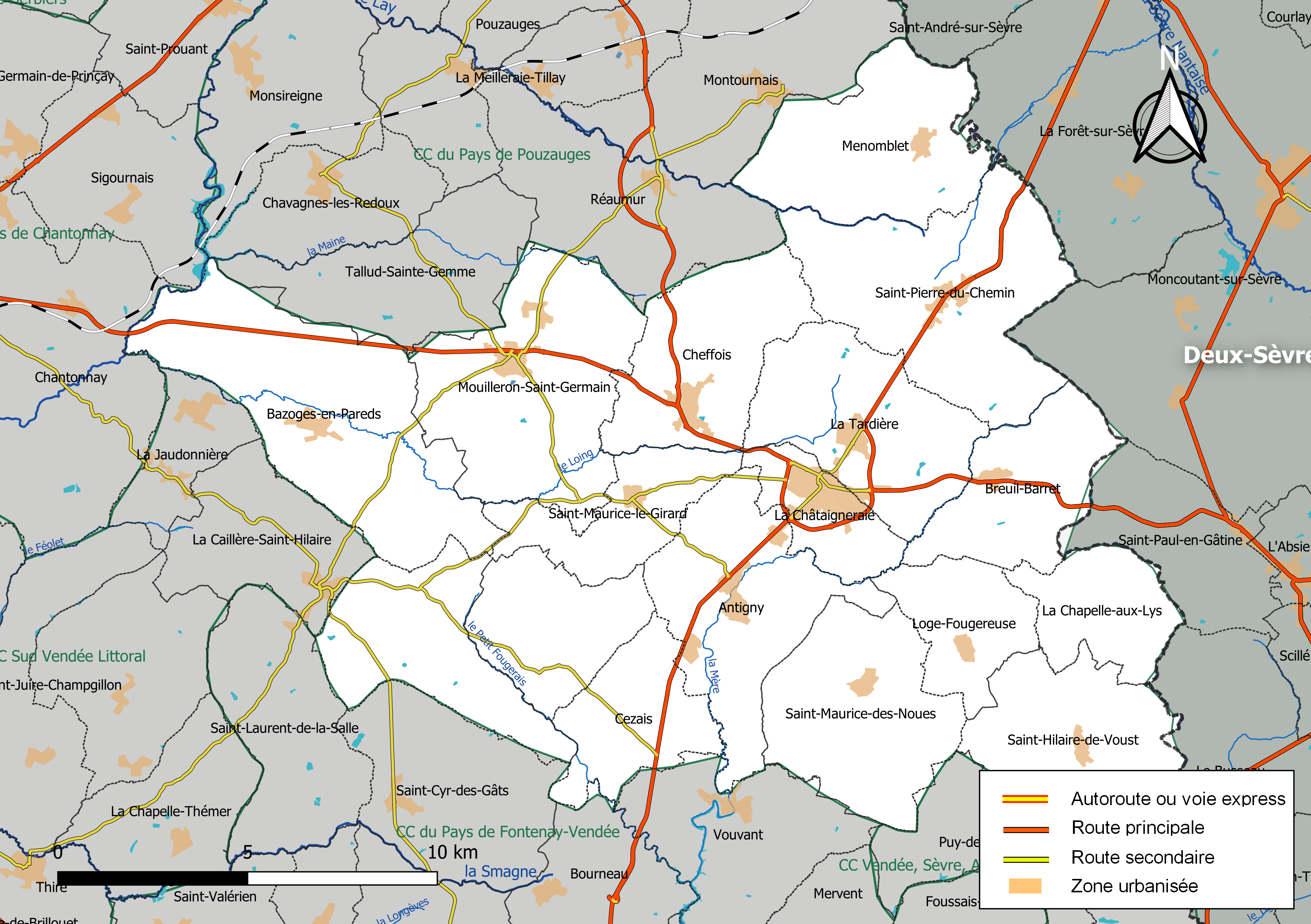 Carte géographique de la Communauté de communes du Pays de la Châtaigneraie, département de la Vendée, France. Composition au 1er janvier 2019.